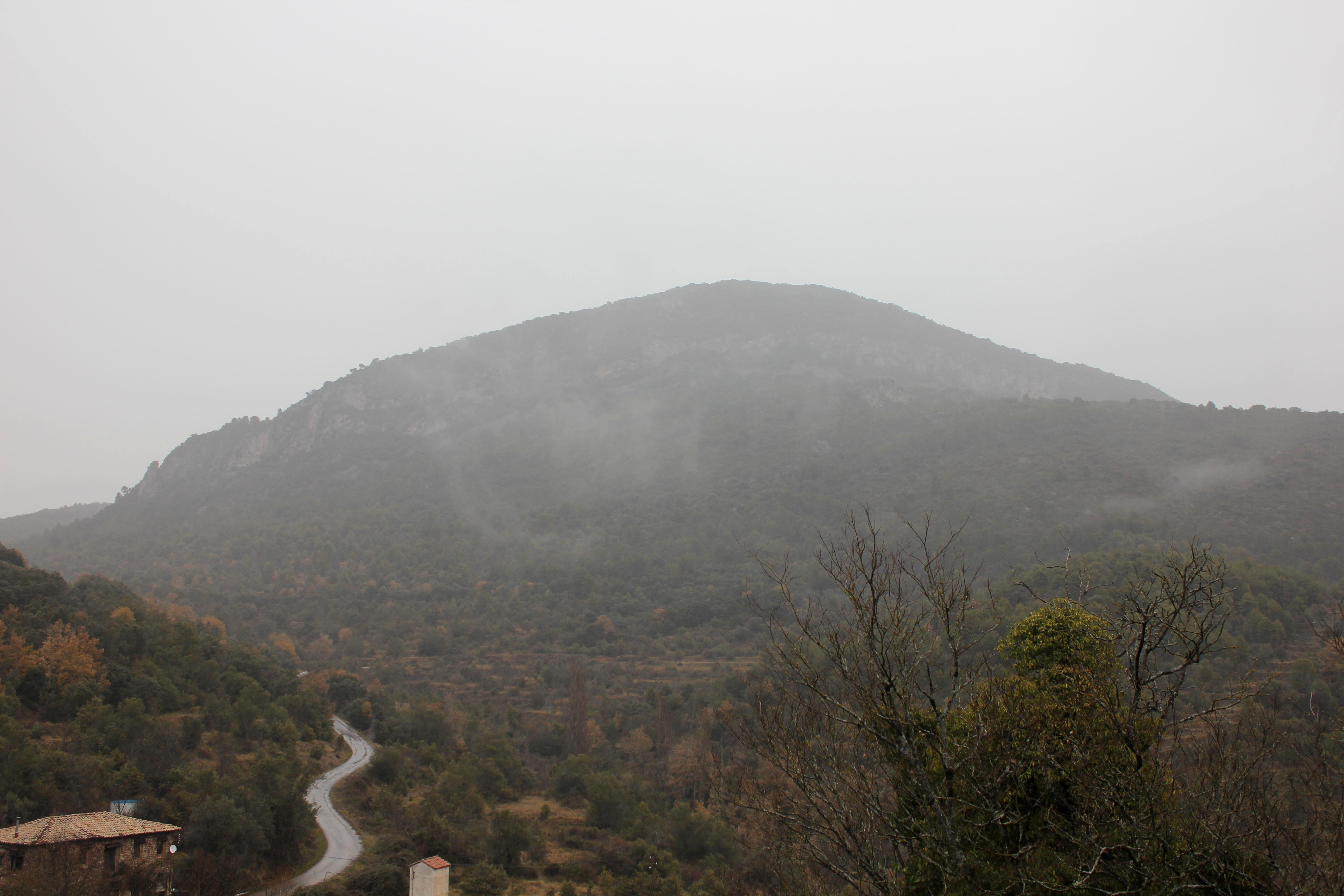 Aragonés: O Tozal de Trillo u de Sant Marcos, visto dende Trillo (A Fueva, Sobrarbe).